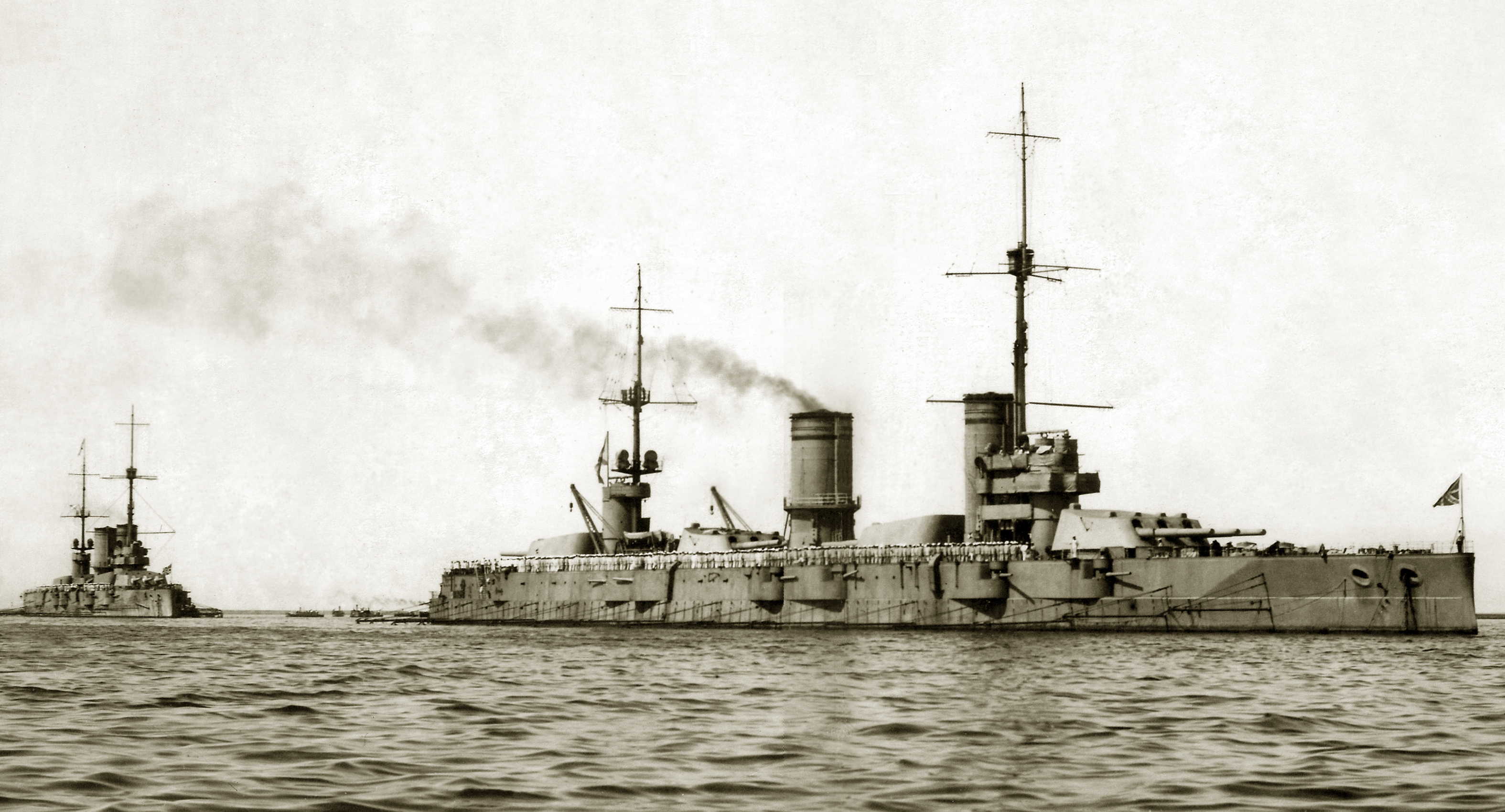 Первая бригада линкоров эскадры линейных кораблей Балтийского флота: (дредноуты «Гангут» и «Петропавловск») под флагом вице-адмирала Кербера